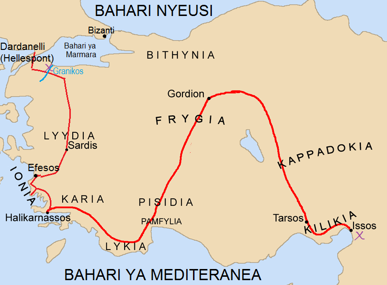 Kiswahili: Njia ya Aleksander Mashuhuri katika Asia Ndogo, kutokana na Aleksanteri-Suuri-333.png